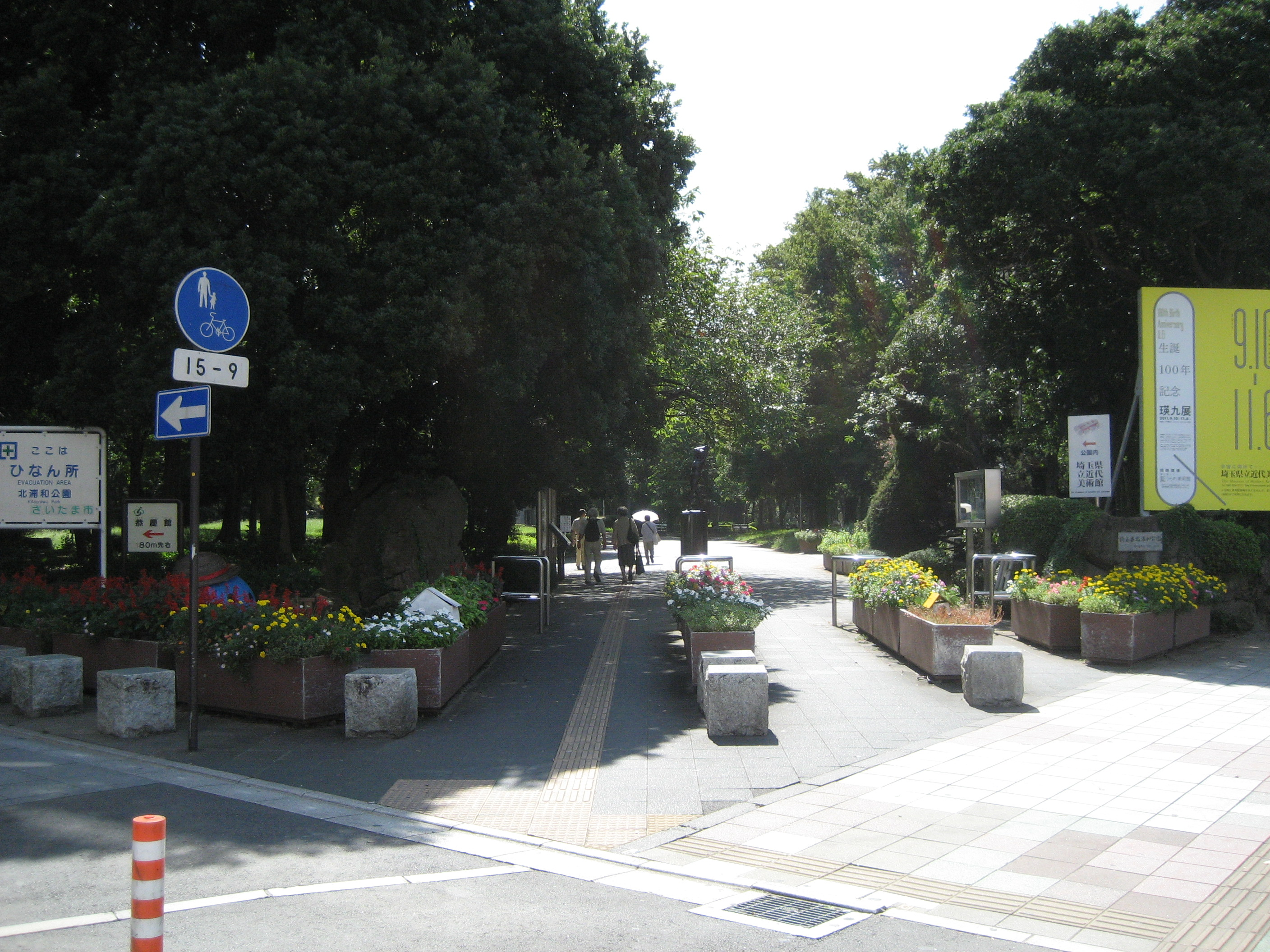 埼玉県立北浦和公園 （北浦和駅側入口）